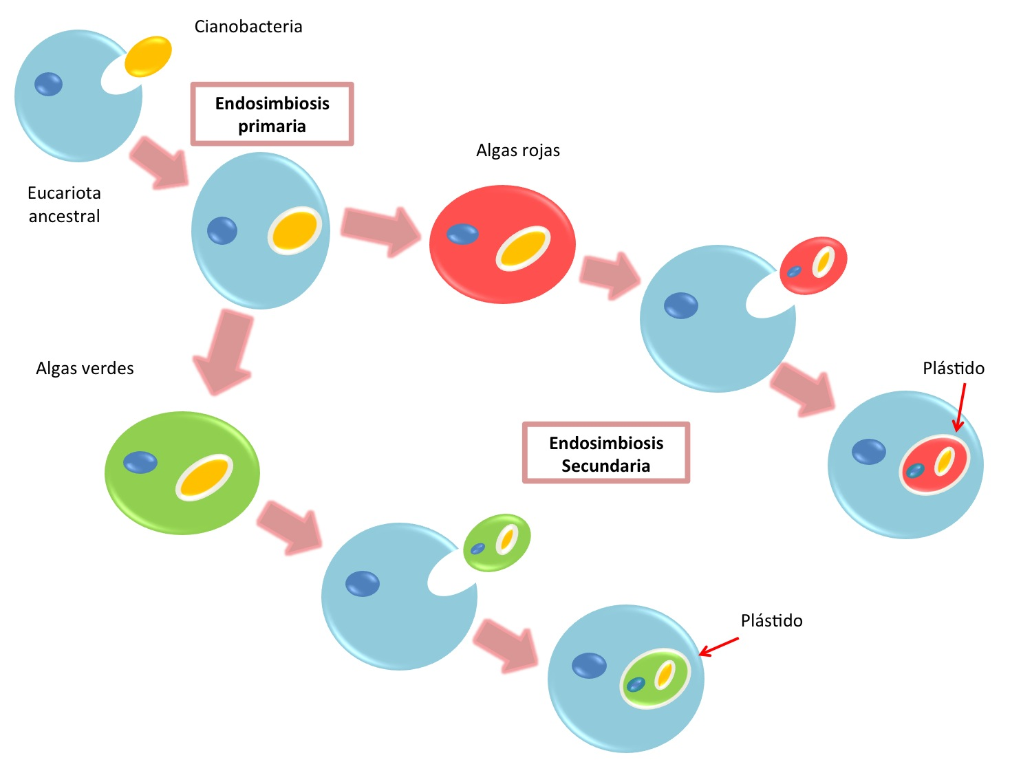 Caricatura descriptiva del origen endosimbionte de los eucariotas fotosintéticos.